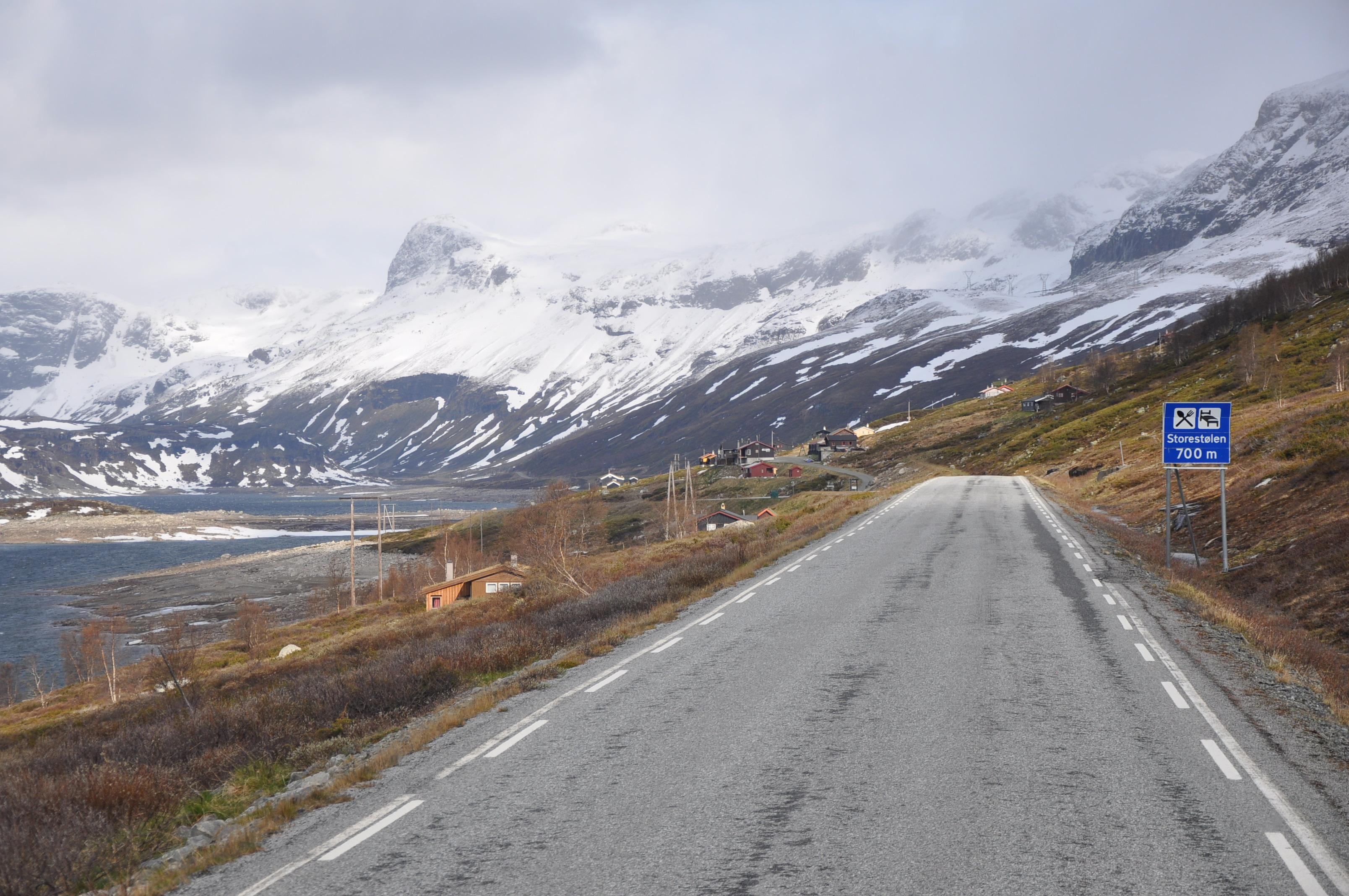 Storestølen